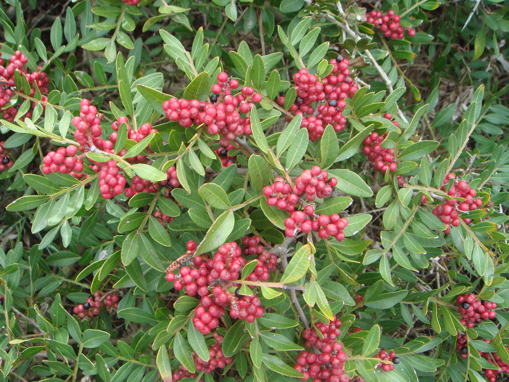 Lentisco (Pistacia lentiscus) en Chiclana, (Cádiz), España